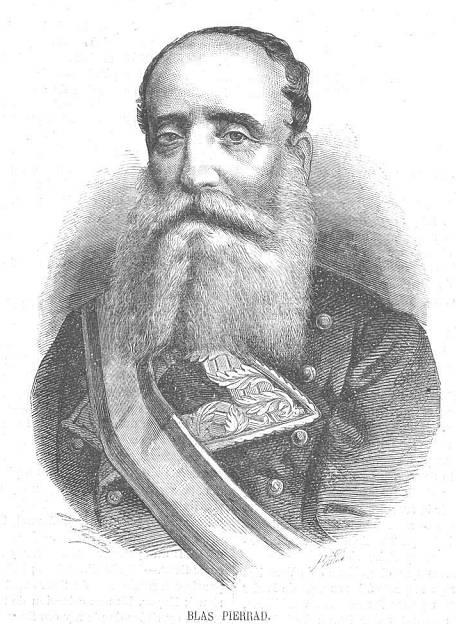 «Blas Pierrad», en la revista La Ilustración Republicana Federal.